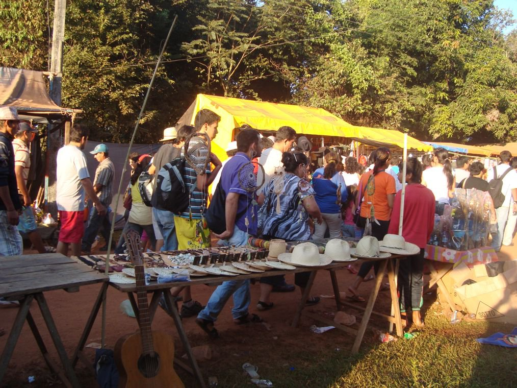 Peregrinos pasan ante un stand de artesania al llegar al sanctuario de la Virgen de Itapé - Guaira (Paraguay).